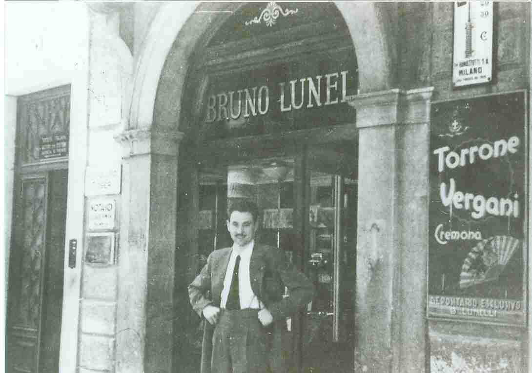 Bruno Lunelli davanti all'enoteca acquisita